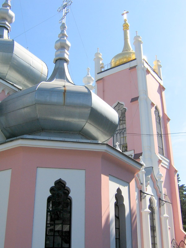 Храм Святого Іоана Златоуста в Ялті